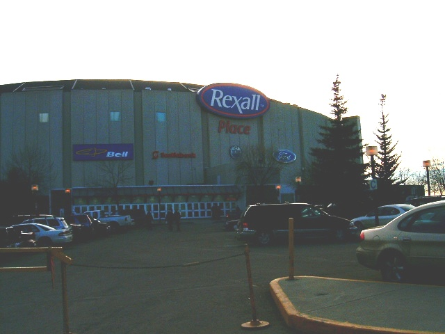 Rexall Place